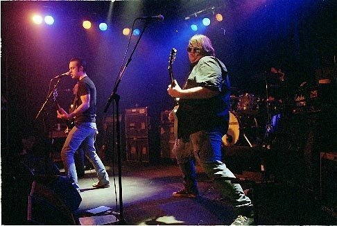 Spelning med The Turpentines på Kägelbanan, Mosebacke i Stockholm 2001